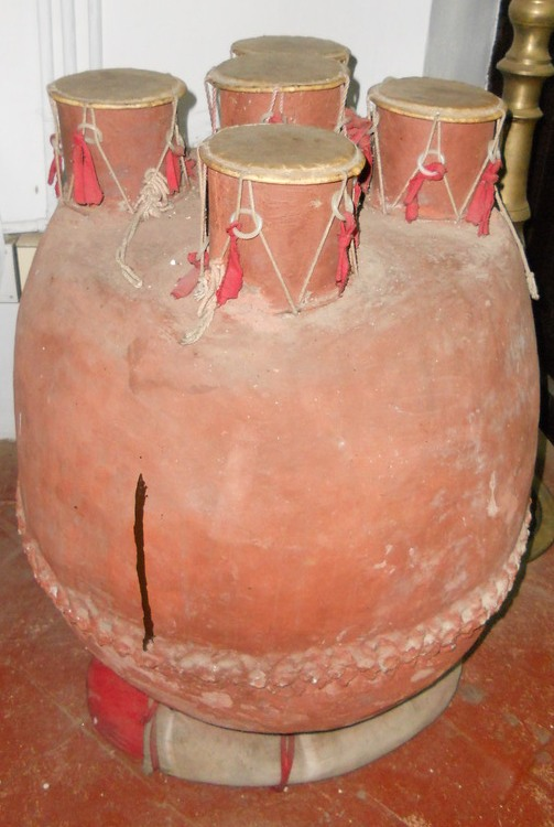 പഞ്ചമുഖമിഴാവ്